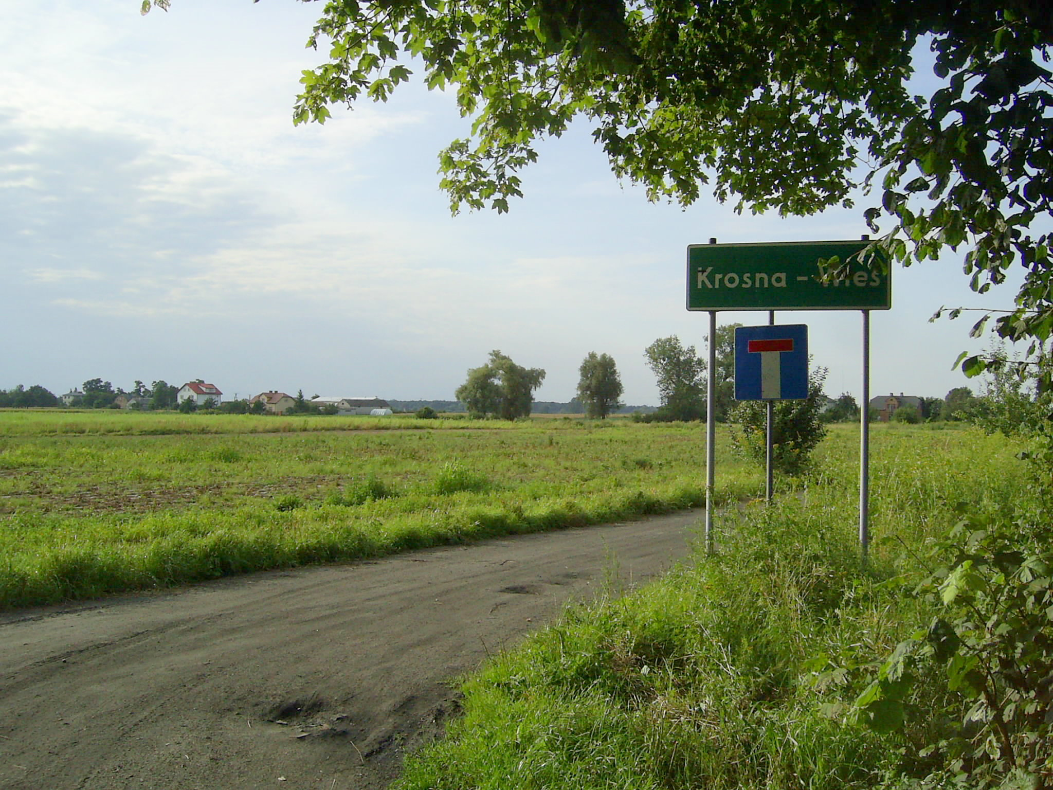 Krosna-Wieś, tablica przy drodze do Biskupic